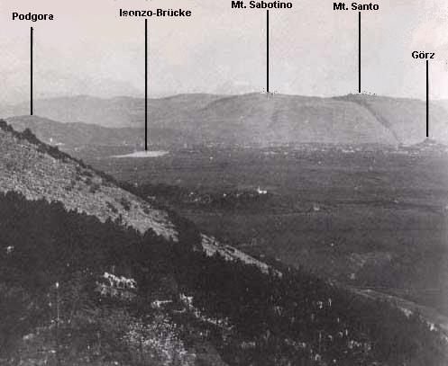 Italienische Aufnahme der Isonzofront bei Görz (evtl 2. Schlacht am Isonzo)